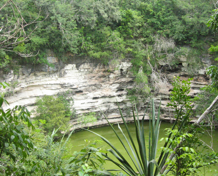 Chichen Itza - Mexique - Cénote Sacré Photo personnelle (ZeBBy) prise le 10 octobre 2004, Mexique Sous licence GFDL ZeBBy octobre 2004